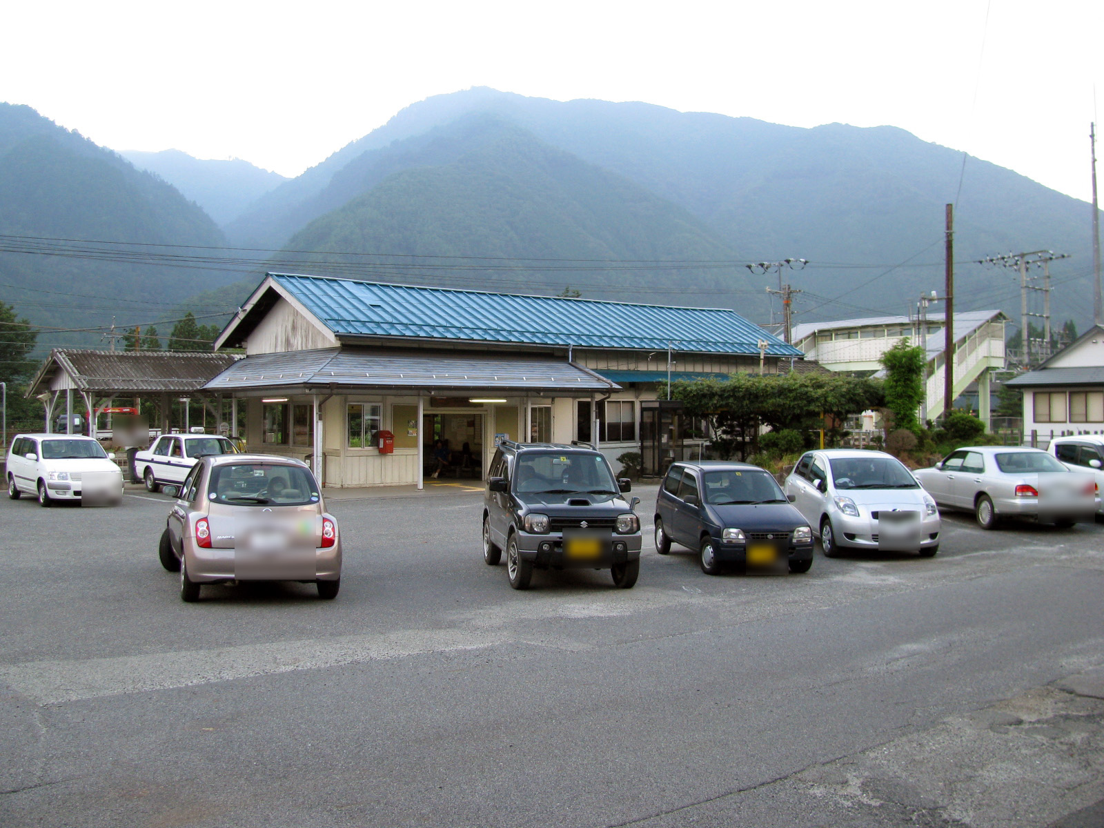 JR中央本線野尻駅